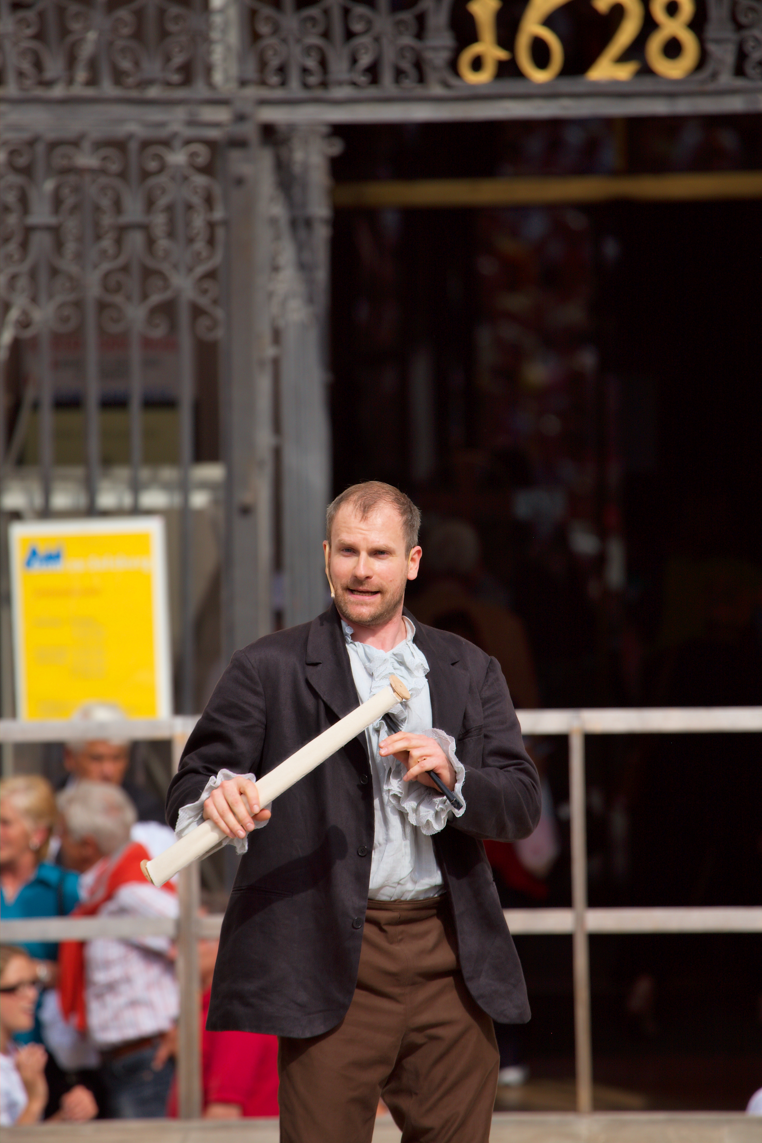 Thomas Limpinsel im Jedermann für ein Person. Eröffnung der Salzburger Festspiele 2008